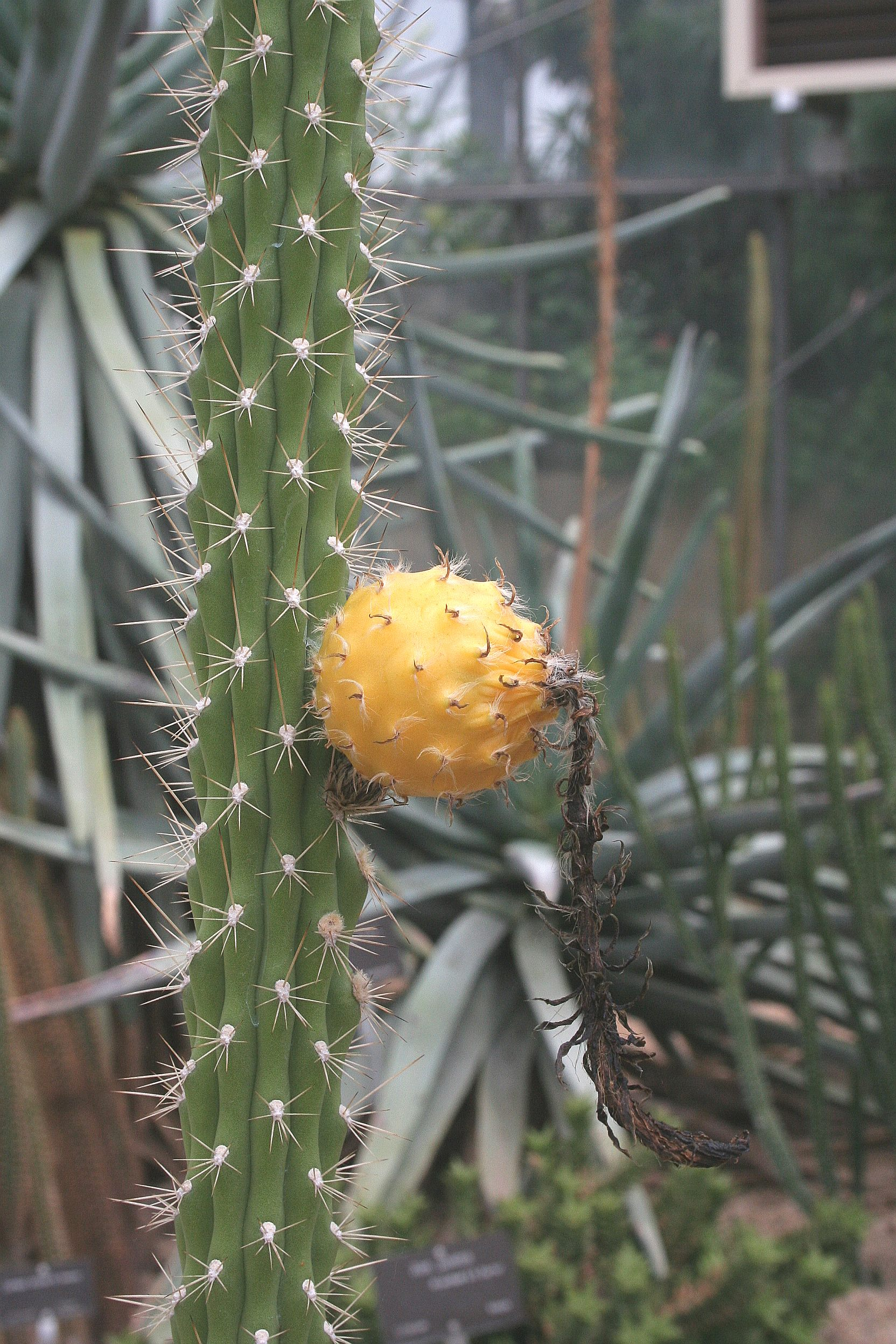 Harrisia gracilis (as Harrisia brookii), Conservatoire botanique national de Brest, France, juin 2007